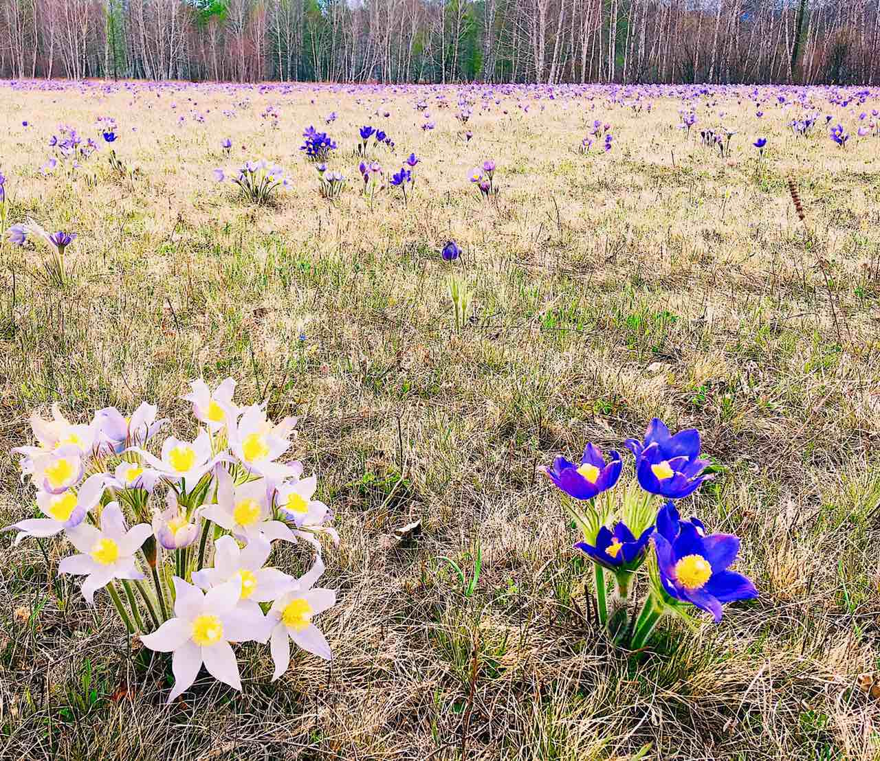 Подснежник. Бурятия